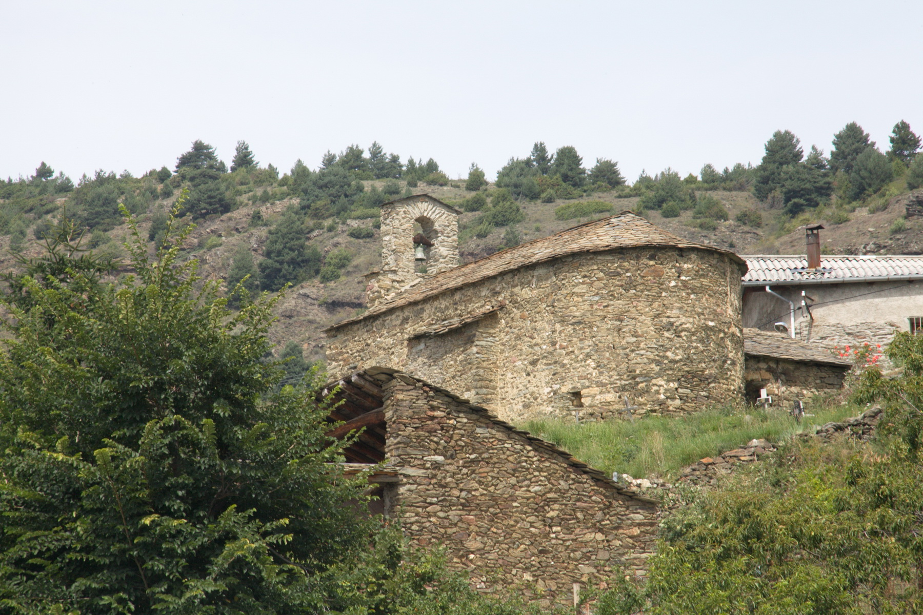 Església d'Avellanet del Cantó, nucli de població del municipi de Montferrer i Castellbò (Alt Urgell, Catalunya)